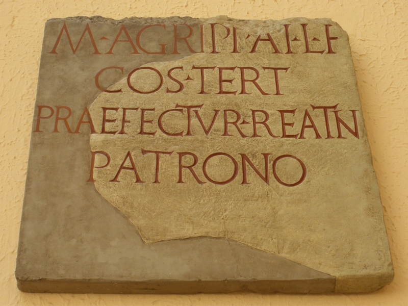 Copie d'une inscription dédicacée par le préfet de Réate à son patron (Agrippa), pendant son 3e consulat. 27 av. J.-C. Provenance : Rieti, Italie. Localisation présente : Mairie de Rieti, Italie. Localisation de la copie : Musée de la civilisation romaine, Rome.